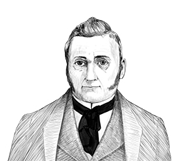 Dessin de Barthélemy Joliette (1789-1850).